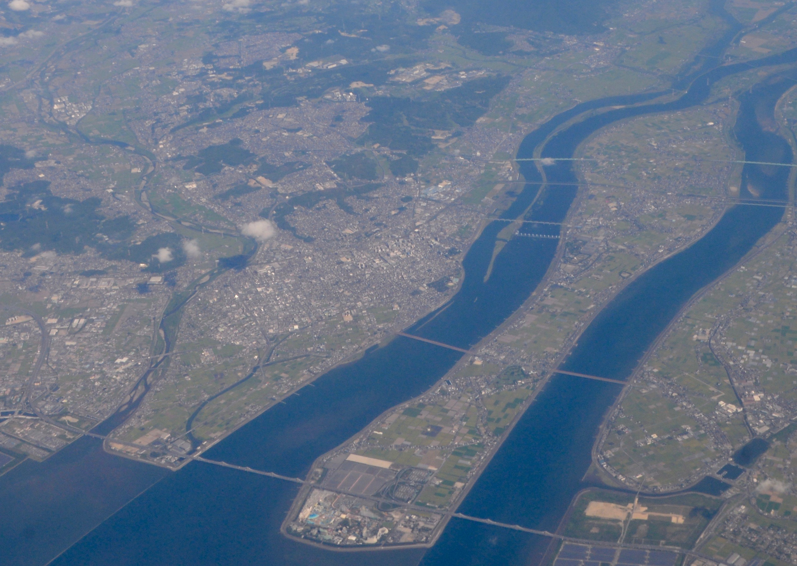 三重県桑名市上空